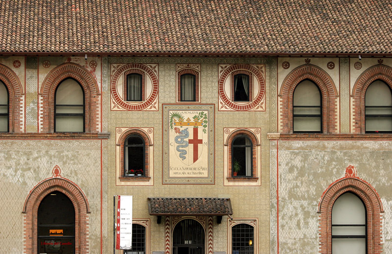 Castello Sforzesco a Milano.